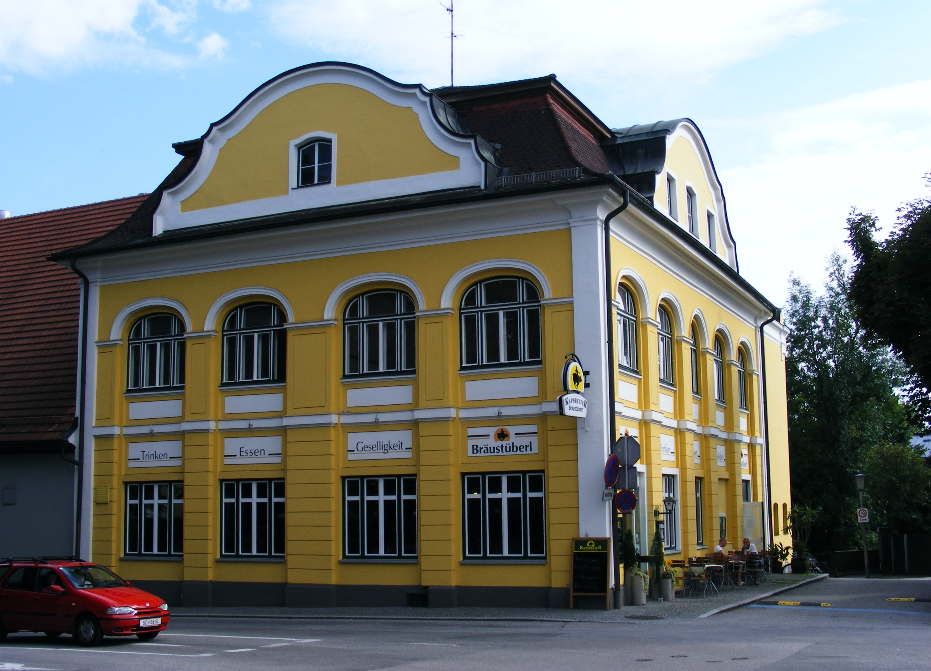 A-4780 Schärding (Oberösterreich) - Schärding - Restaurent Bräustüberl (Kapsreiter-Bier) neben der Brauerei Jos. Baumgartner AG